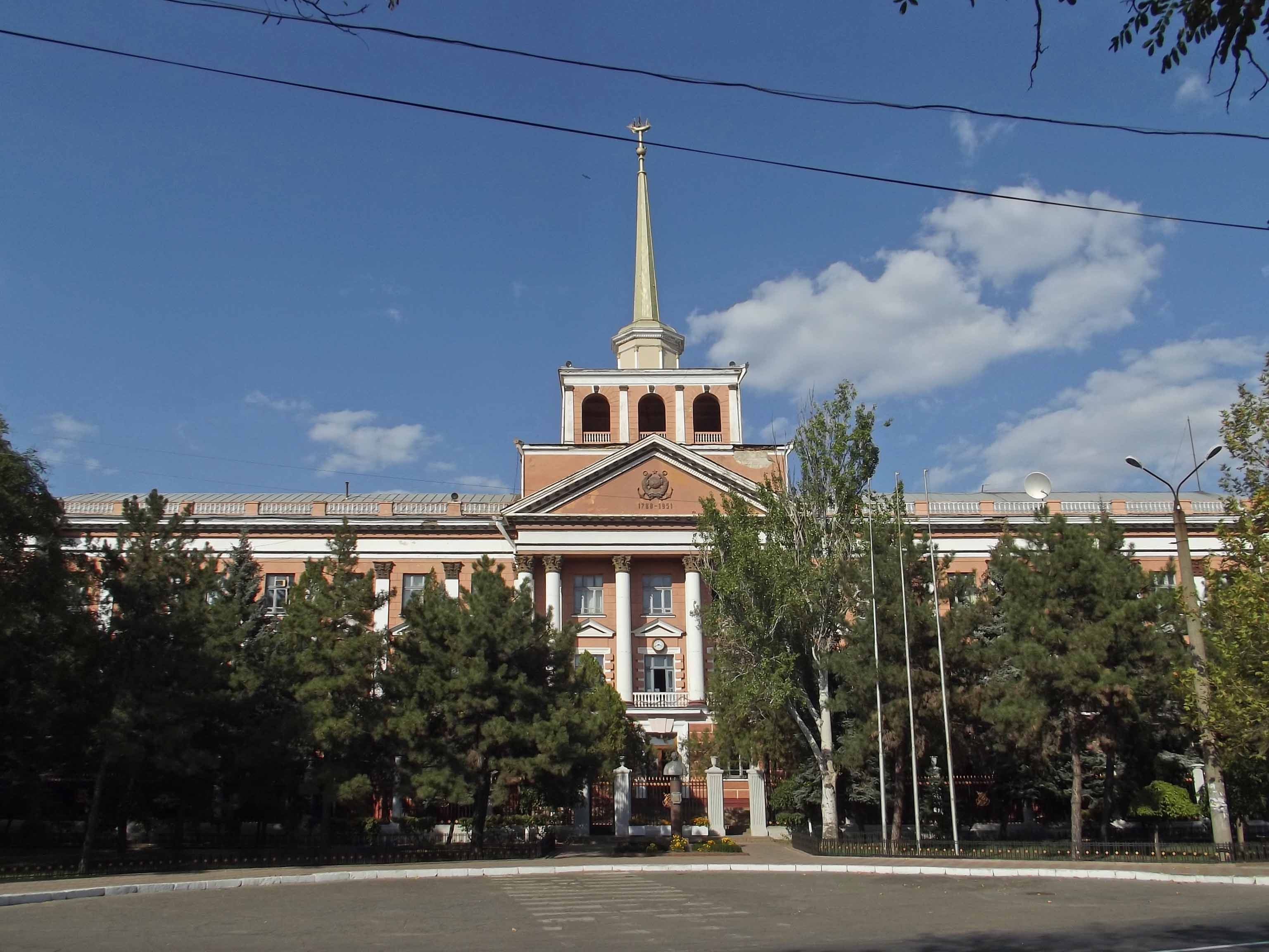 Управление завода им. 61 коммунара